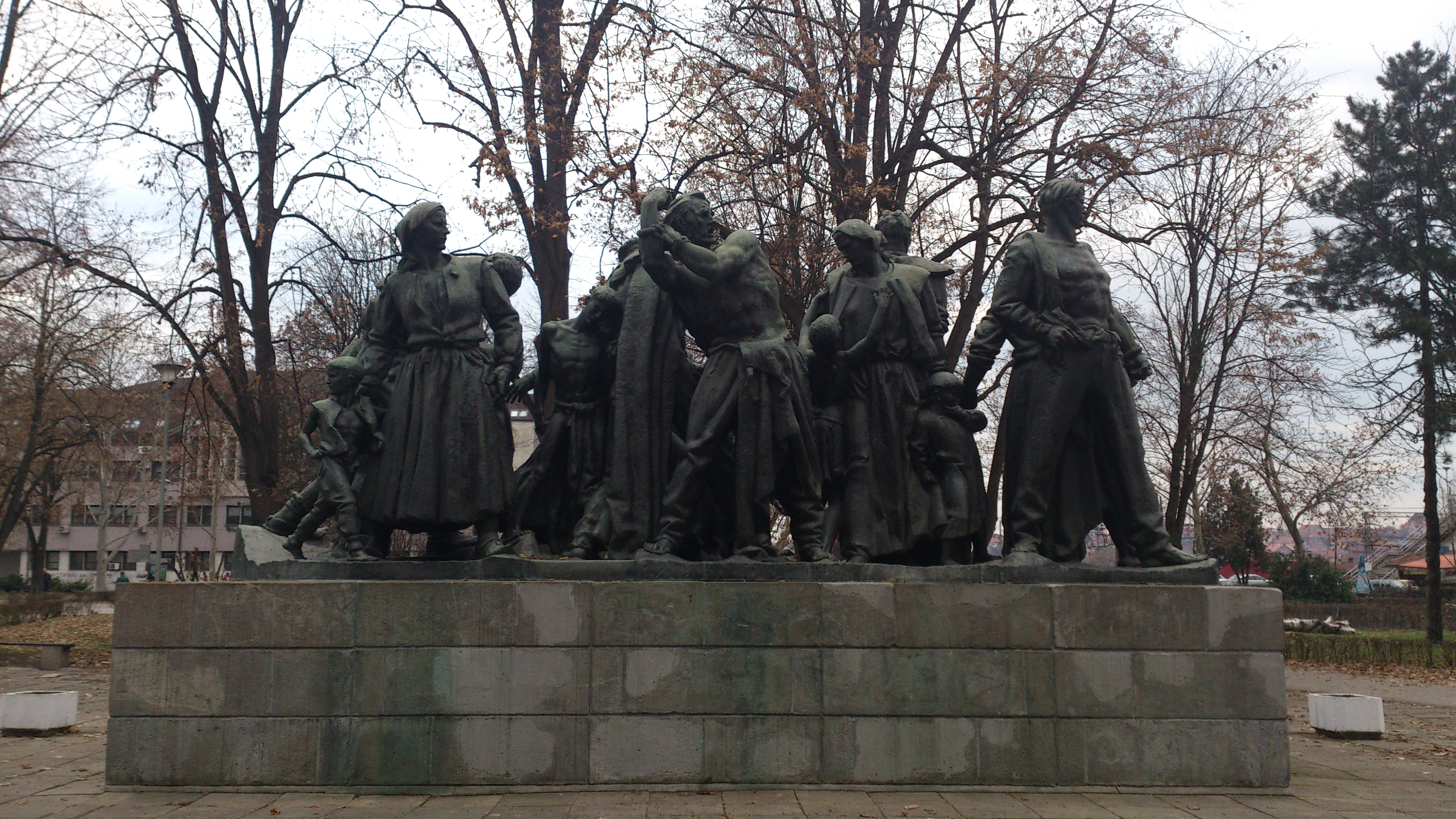 Oко 5000 грађана Краљева које су стрељали немачки војници 1941. године.